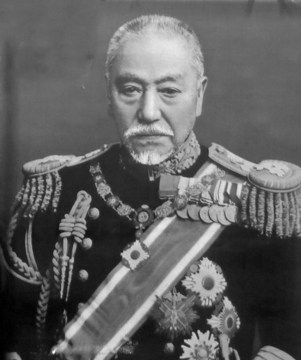 東鄕平八郞 (Tōgō Heihachirō)